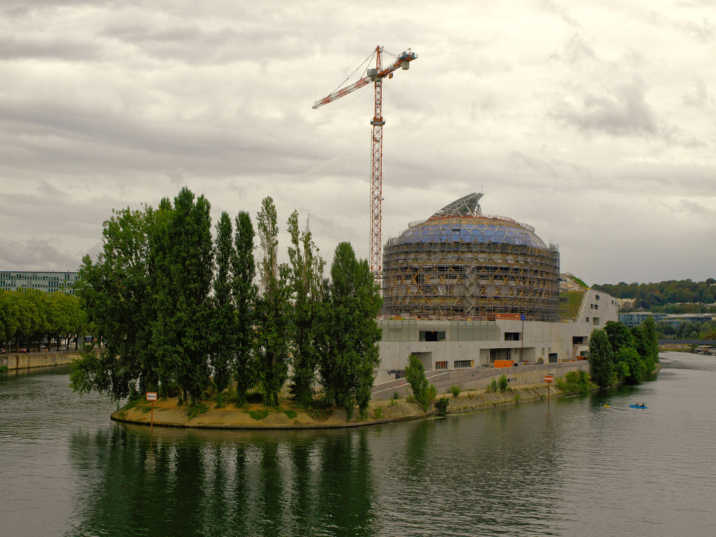 Chantier de la Cité Musicale de l'île Seguin prise en septembre 2016 depuis la Pont de Sèvres